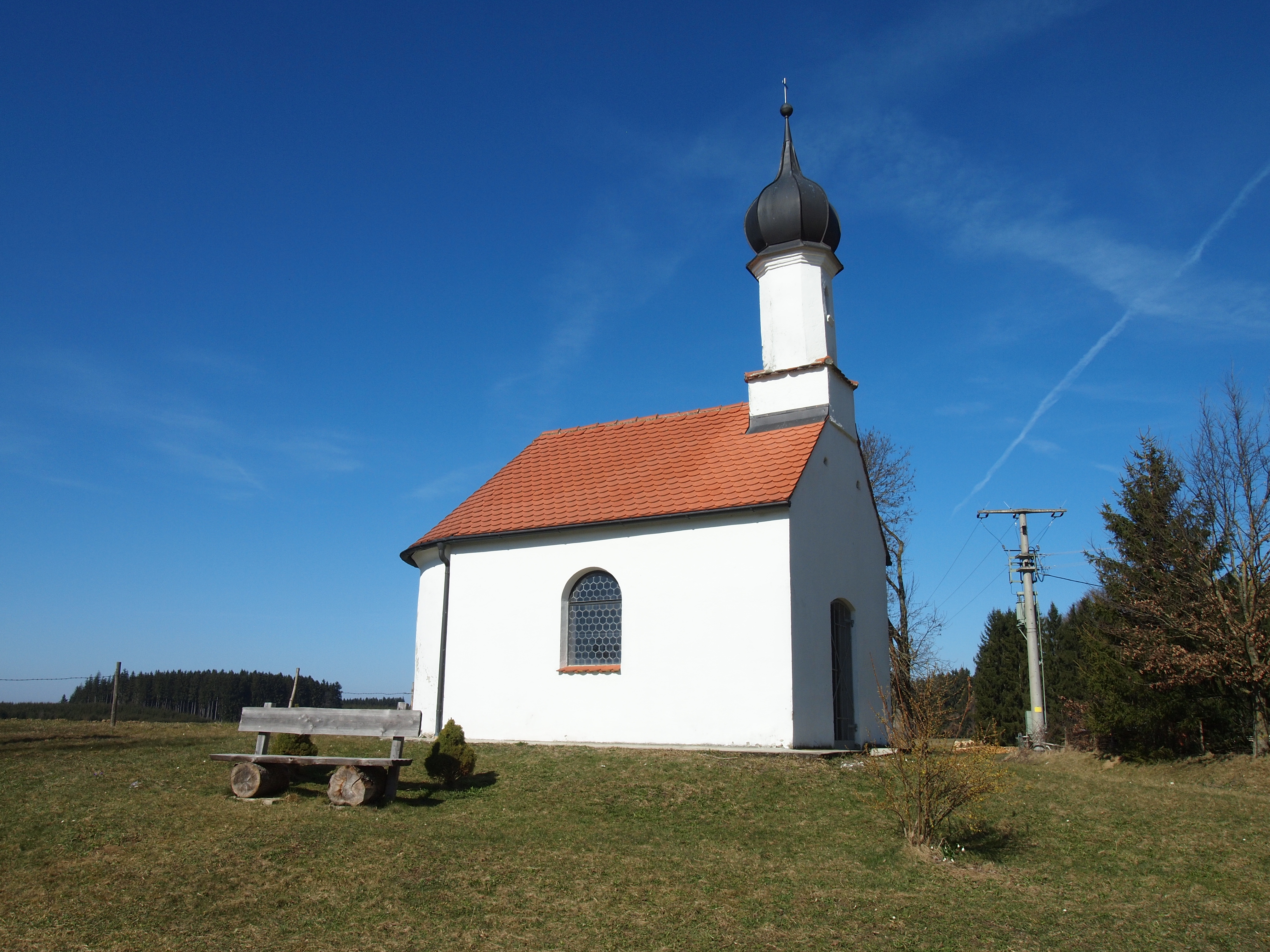 Lechsberg 5, Gemeinde Fuchstal, Kapelle